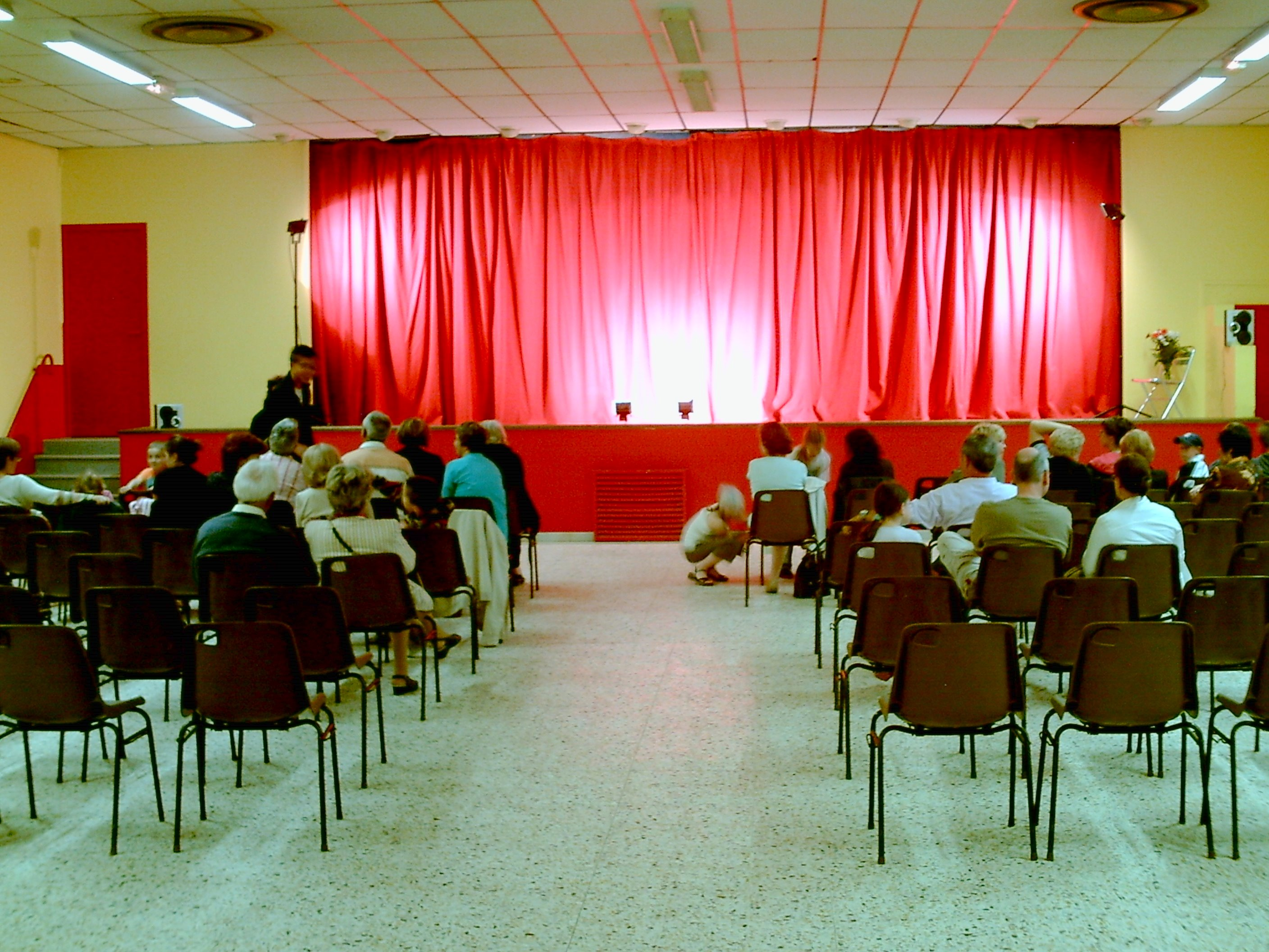 Serpaize (Isère, France)